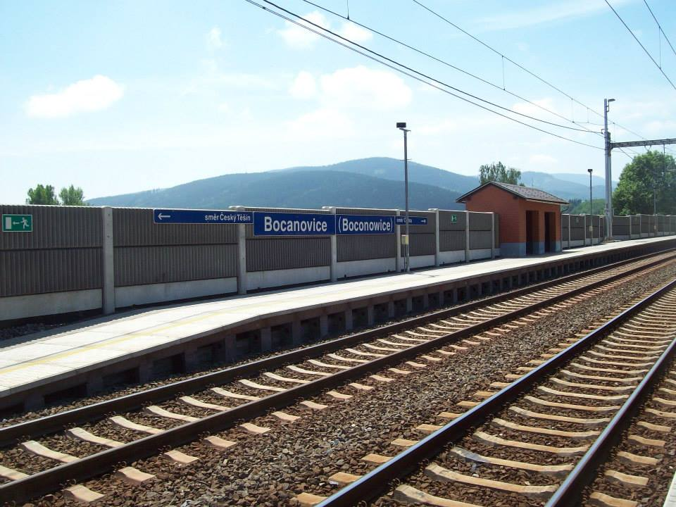 Železniční zastávka